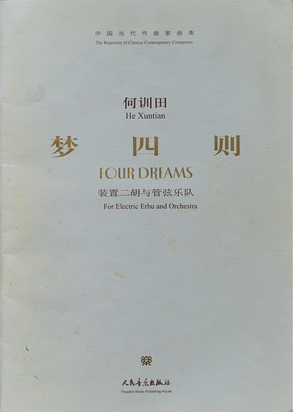 He Xuntian Four Dreams